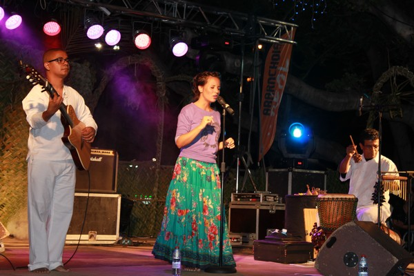 'Audrey Dardenne ek son band', qui était ce soir-là en trio